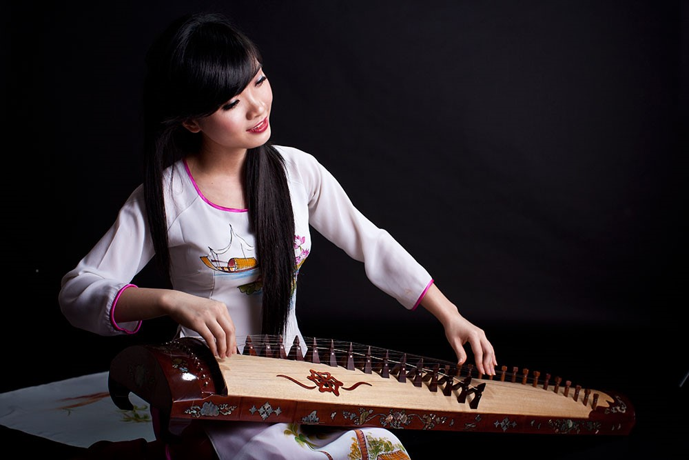 Ảnh được lấy từ trang wed bán đàn tranh Tạ Thâm